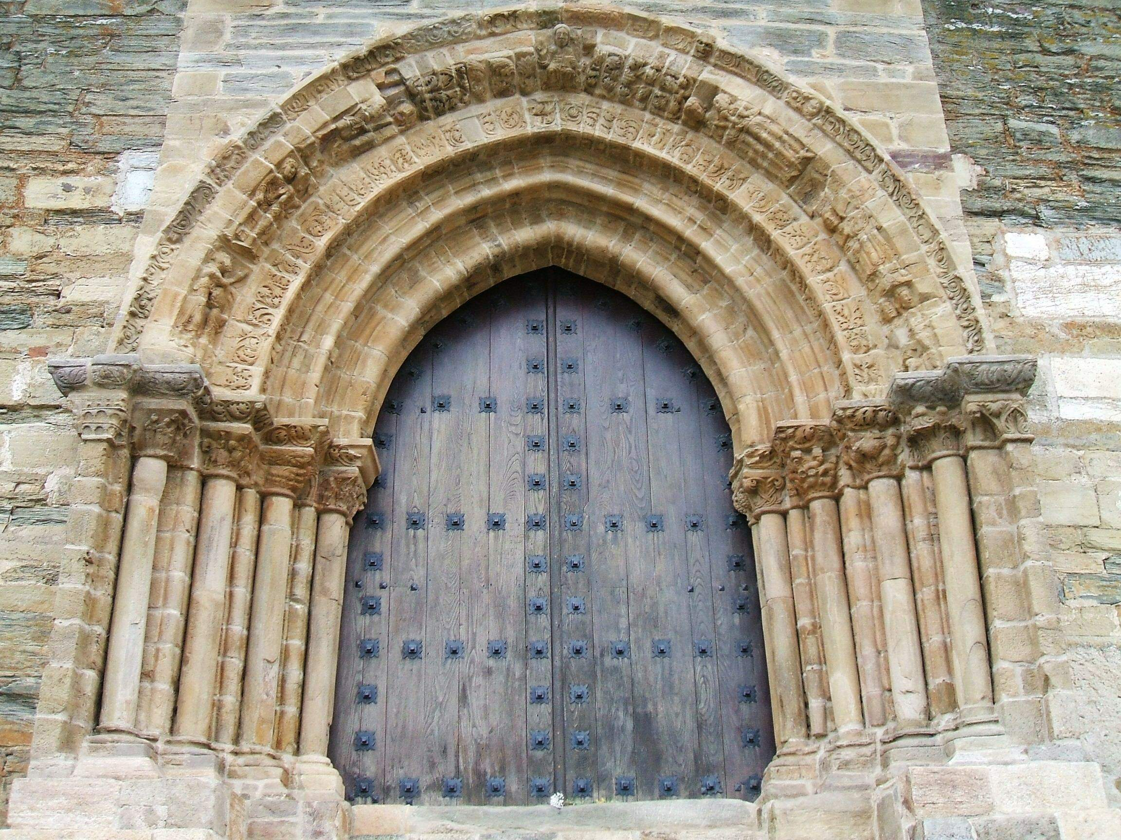 Church of Santiago, Villafranca del Bierzo (León)